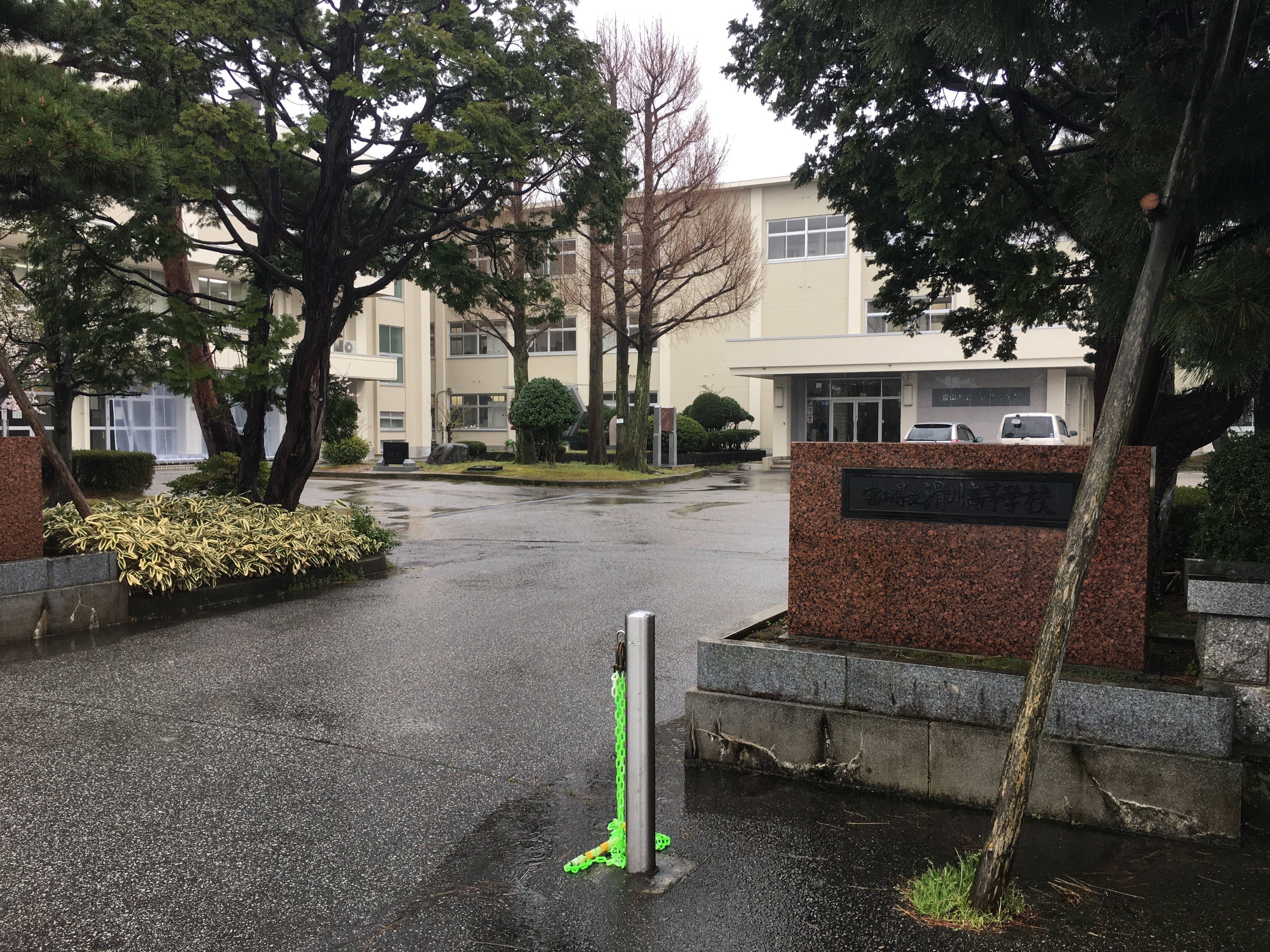 富山県立滑川高等学校正門